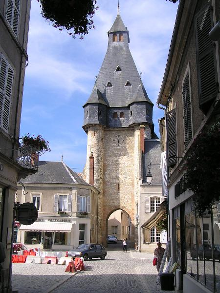 beffroi de Dun/Auron (Cher)